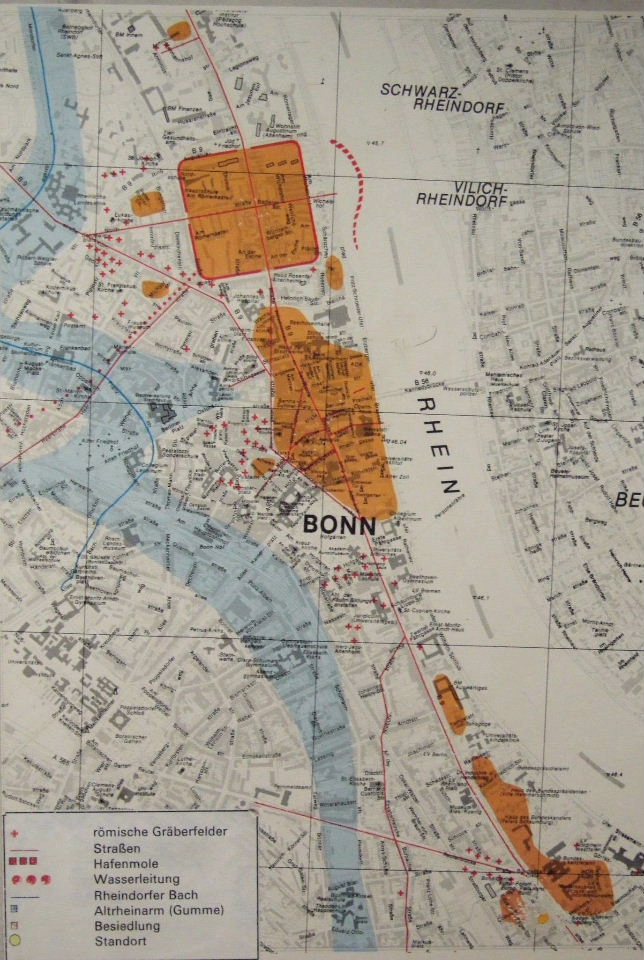 Bonn-Karte mit römischem Siedlungsbereich (orange eingefärbt)/ der hellblau eingefärbte Bereich ist die Gumme